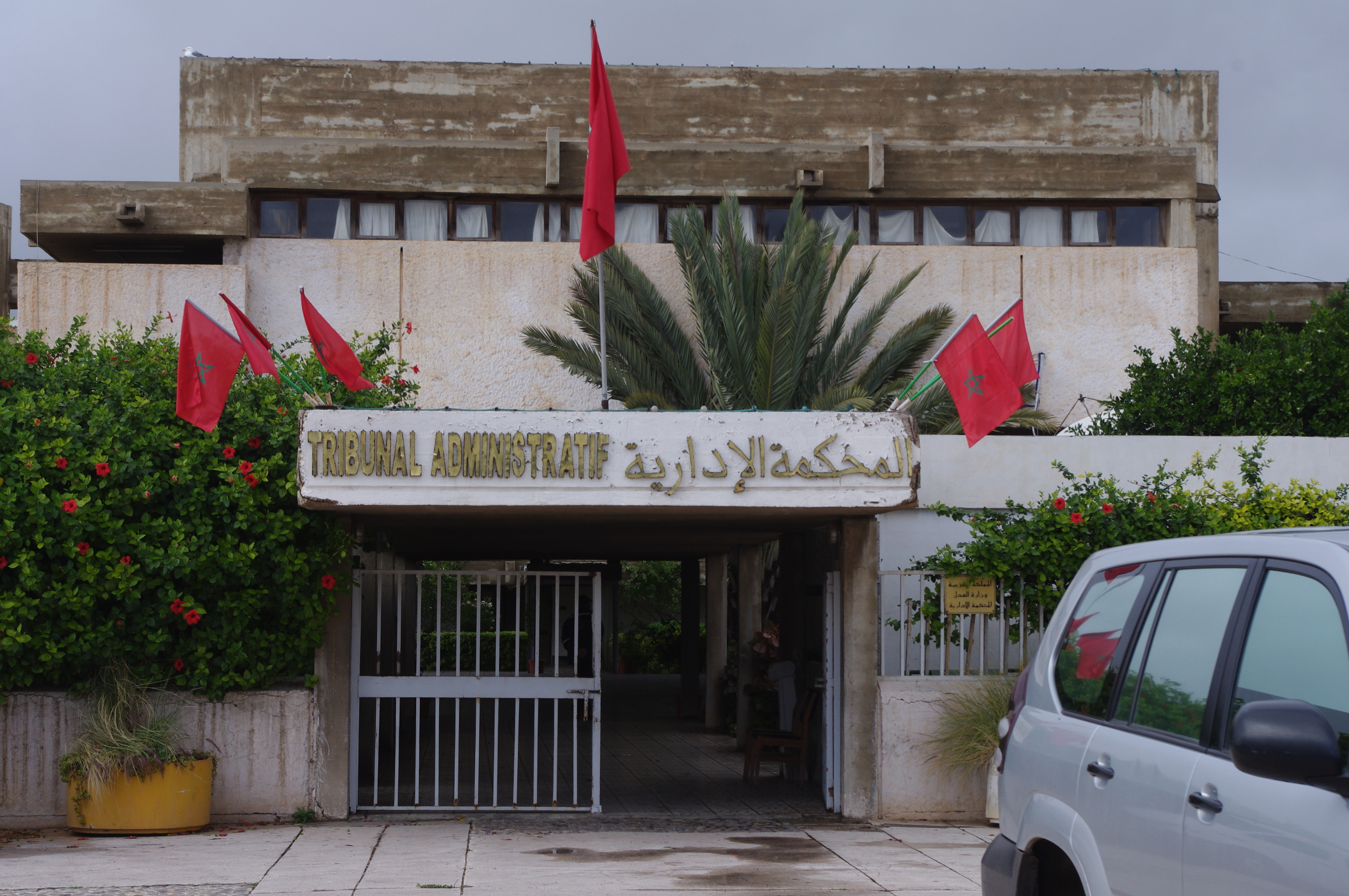 Tribunal Aministratif